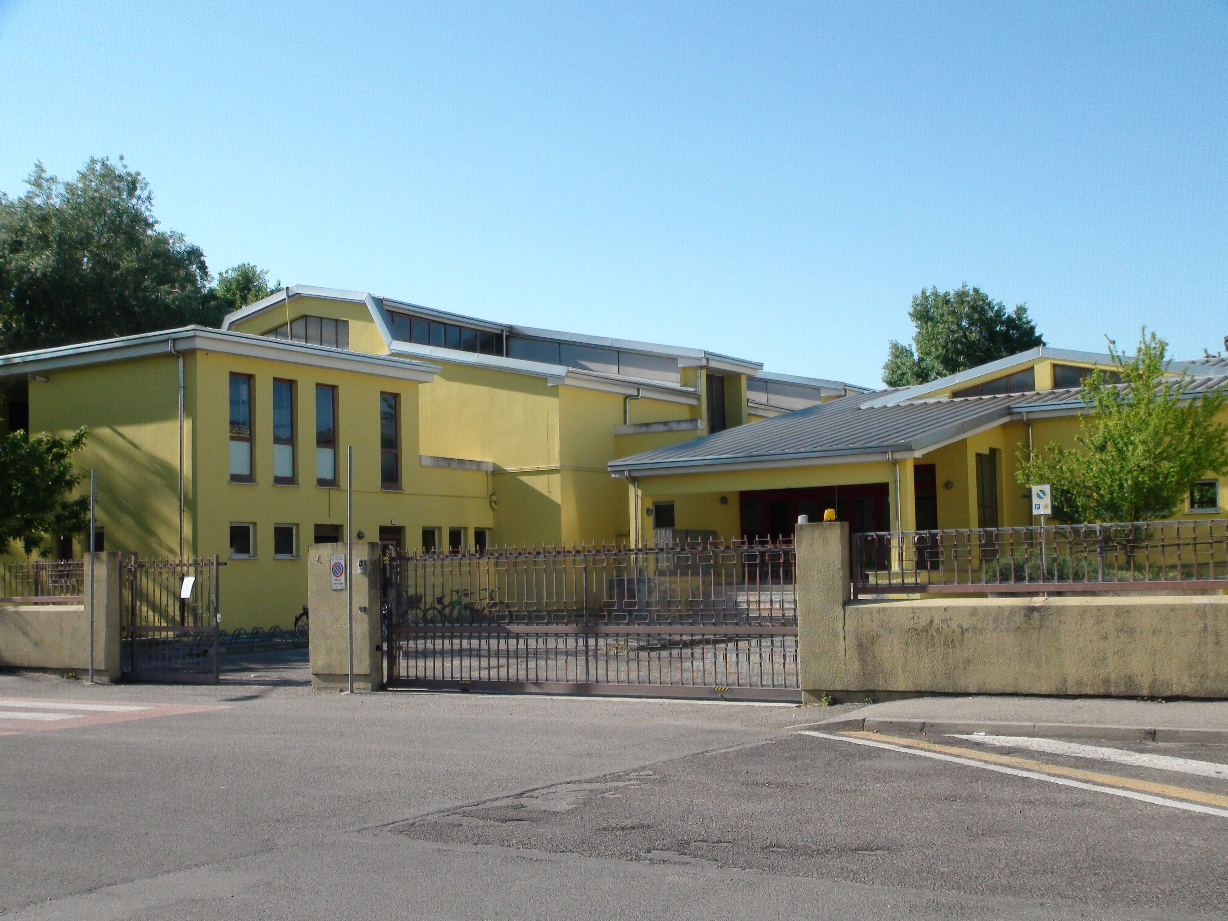 Scuola Media Falcone, Suzzara